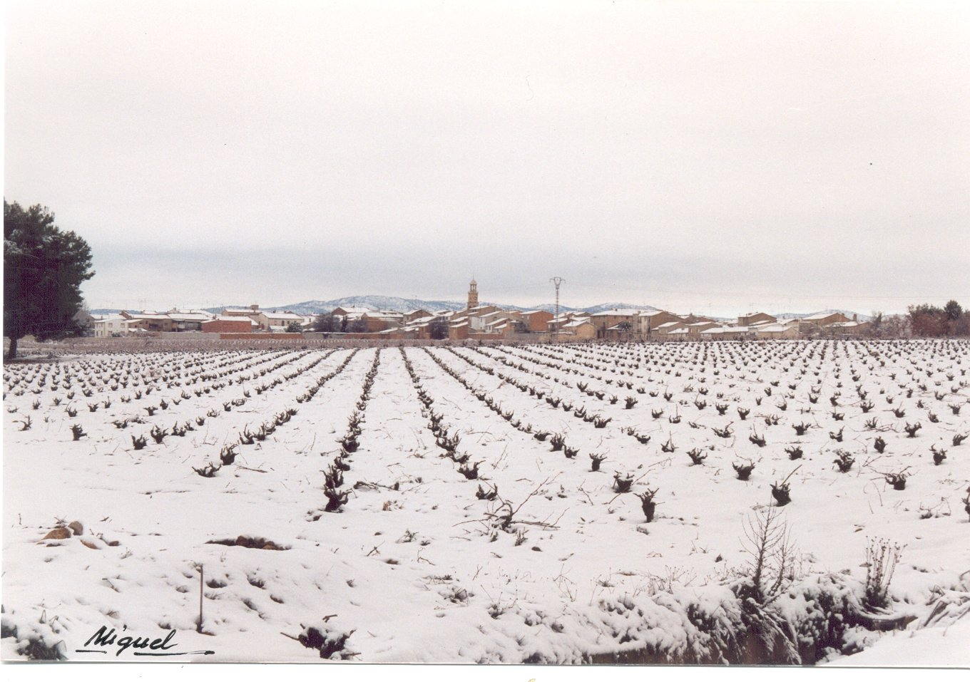 Los corrales de Utiel nevado.